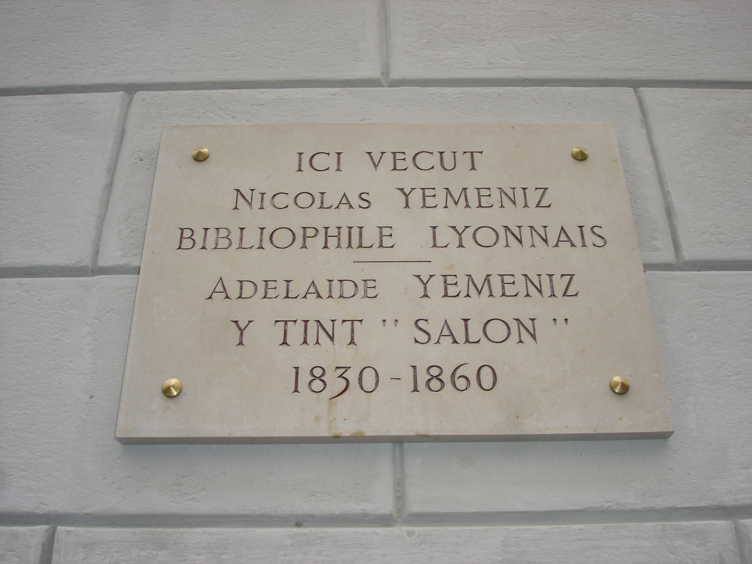 Plaque apposé sur la façade de l'Hôtel de Cuzieu situé 30 rue Sainte-Hélène à Lyon en France.